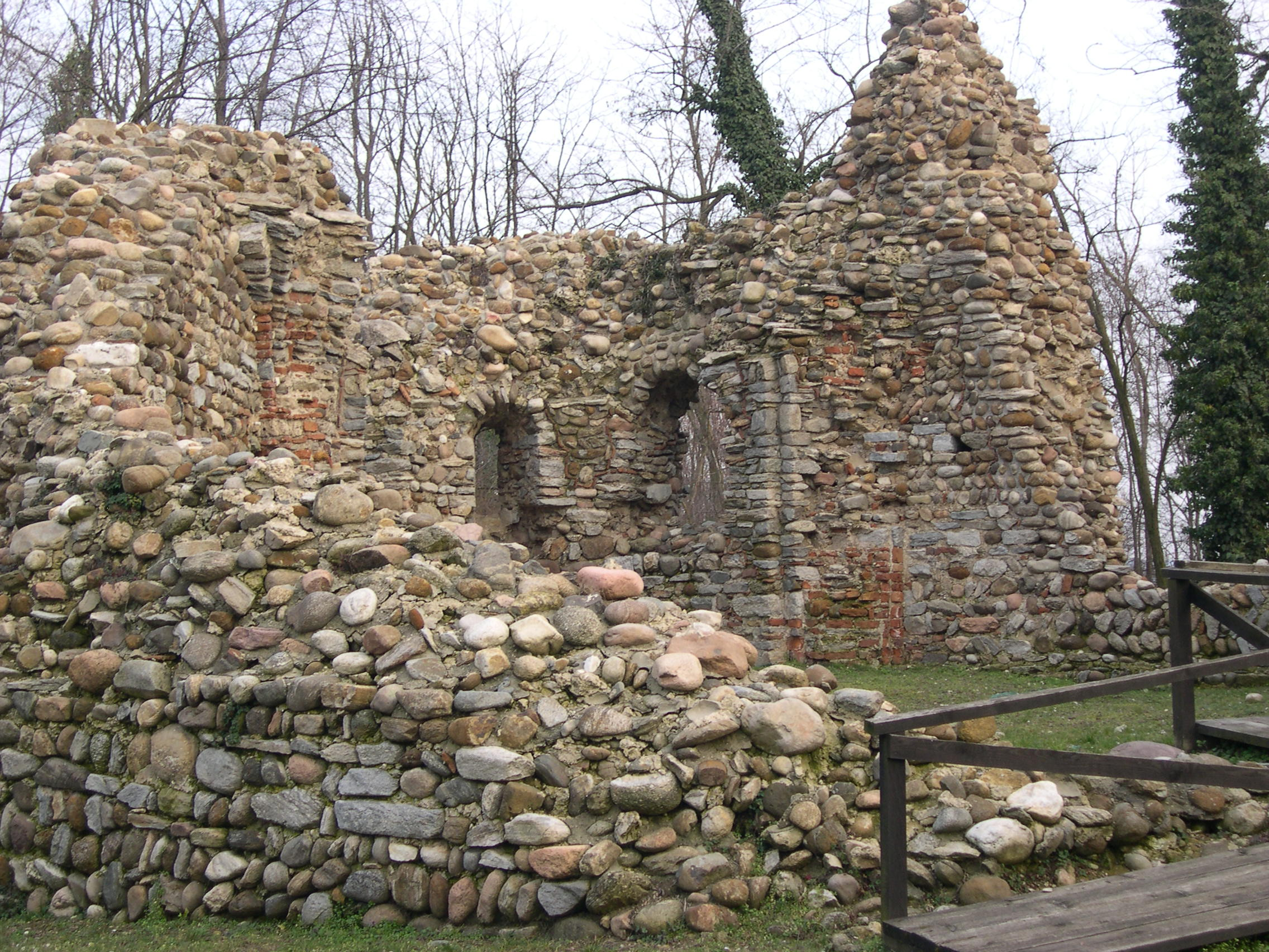 I resti della Chiesa di San Paolo, Castrum di Castelseprio